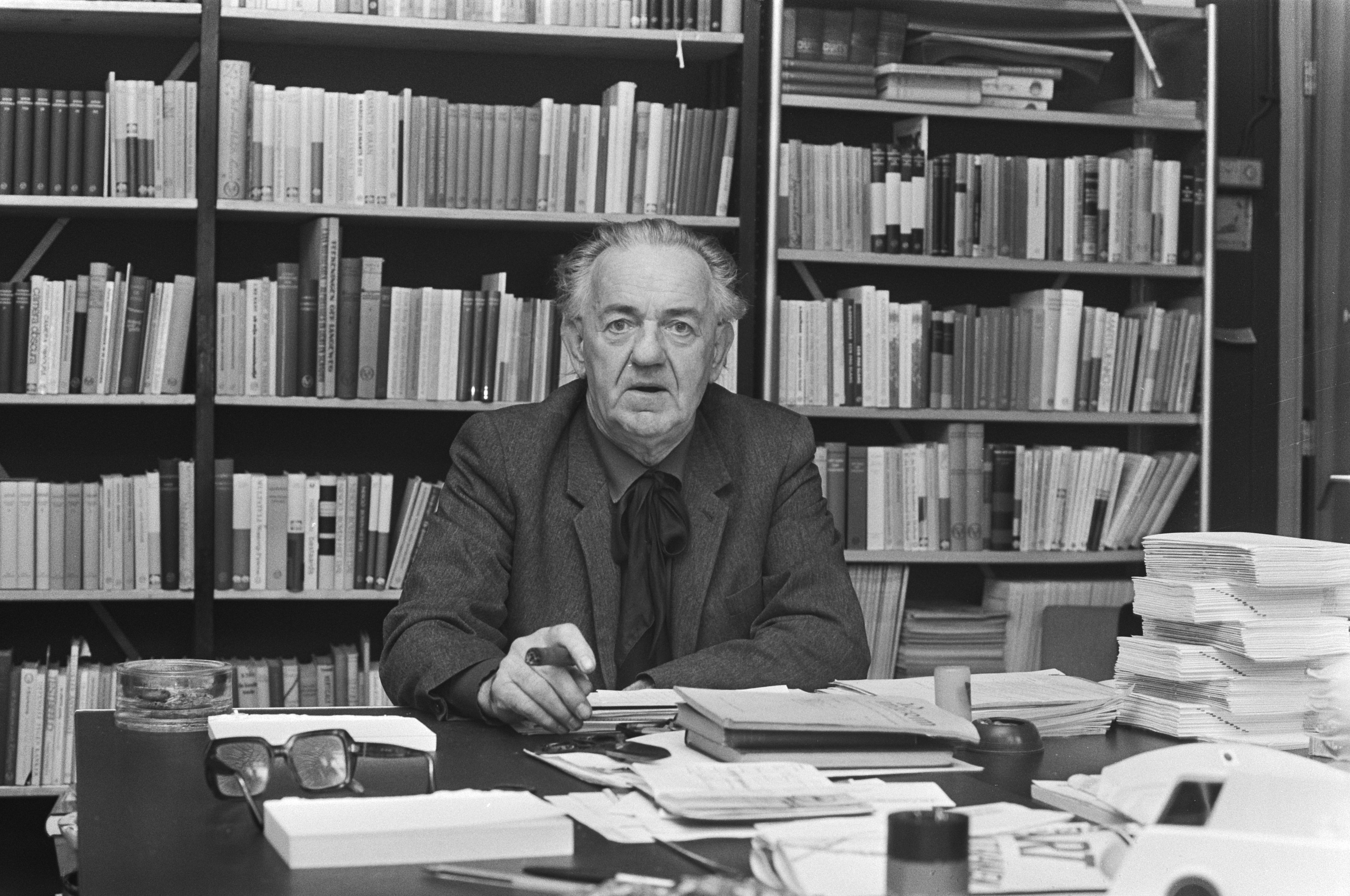 Collectie / Archief : Fotocollectie Anefo Reportage / Serie : [ onbekend ] Beschrijving : Uitgever Van Oorschot ; opdracht Datum : 27 september 1976 Trefwoorden : uitgevers Persoonsnaam : Van Oorschot Fotograaf : Bogaerts, Rob / Anefo Auteursrechthebbende : Nationaal Archief Materiaalsoort : Negatief (zwart/wit) Nummer archiefinventaris : bekijk toegang 2.24.01.05 Bestanddeelnummer : 928-8048